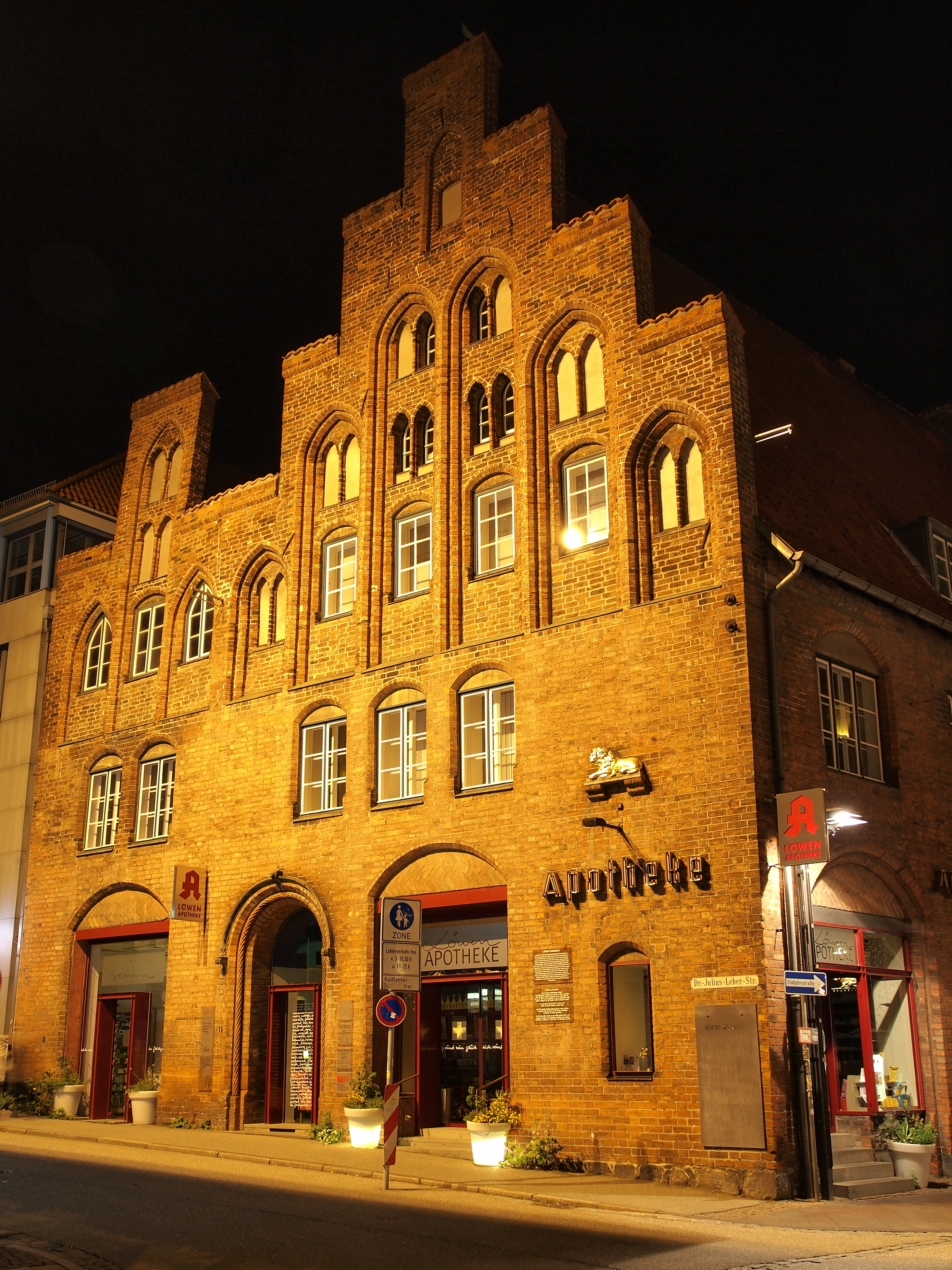 Die Löwenapotheke in Lübeck, Dr.-Julius-Leber-Str. This is a photograph of an architectural monument.It is on the list of cultural monuments of Lübeck